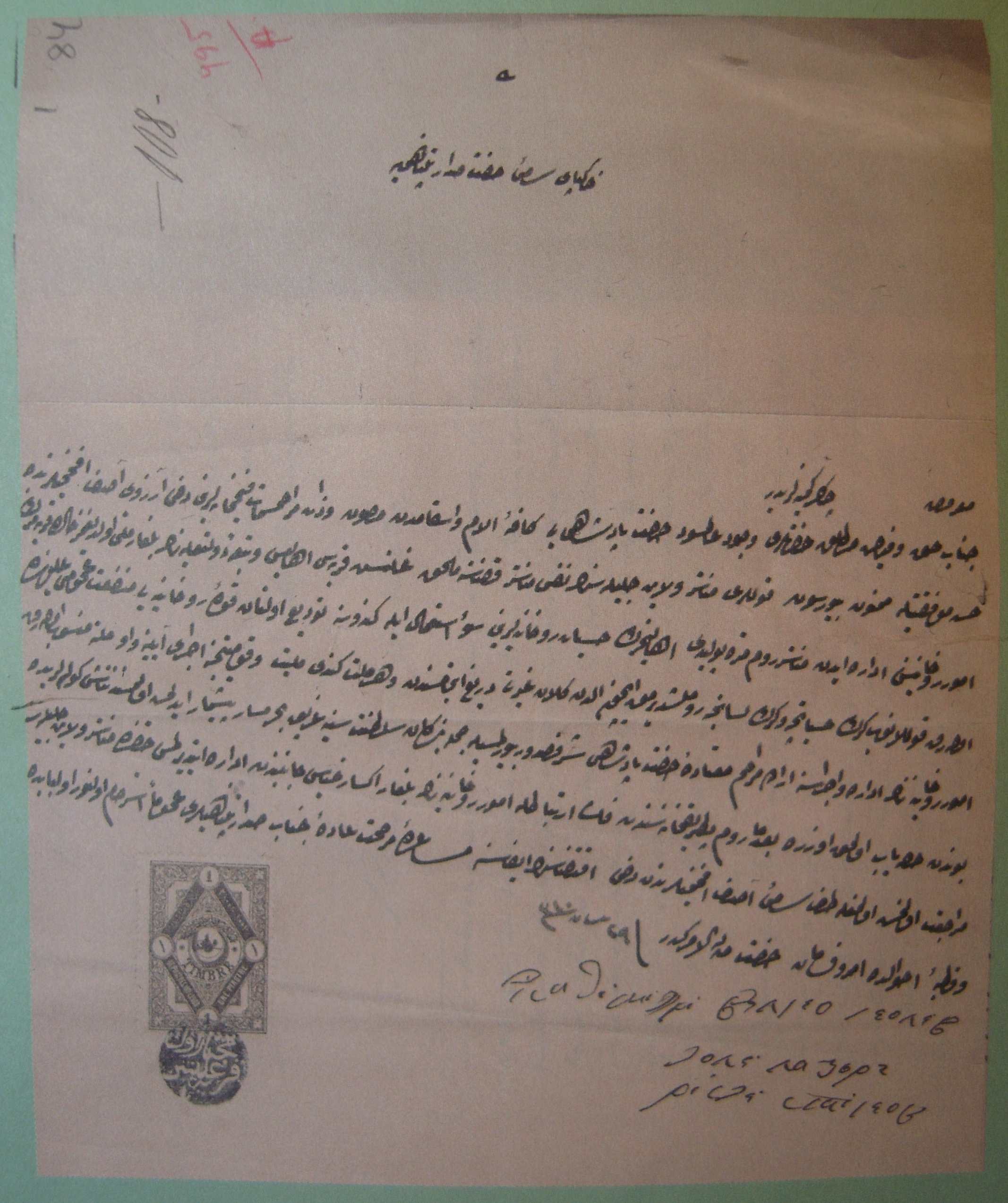 Истирхам (заявление) от жителите на Гнилеж, Битолско до Великия везир, 29 април 1894 г.